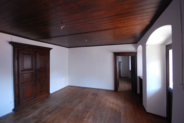 Stube nach der Restaurierung